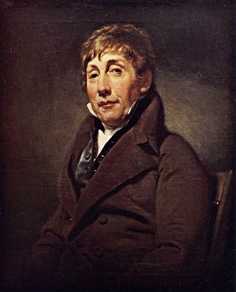 Carel de Vos van Steenwijk (1759-1830). Bevindt zich in Museum de Fundatie, collectie Stichting Hannema- de Stuers Fundatie